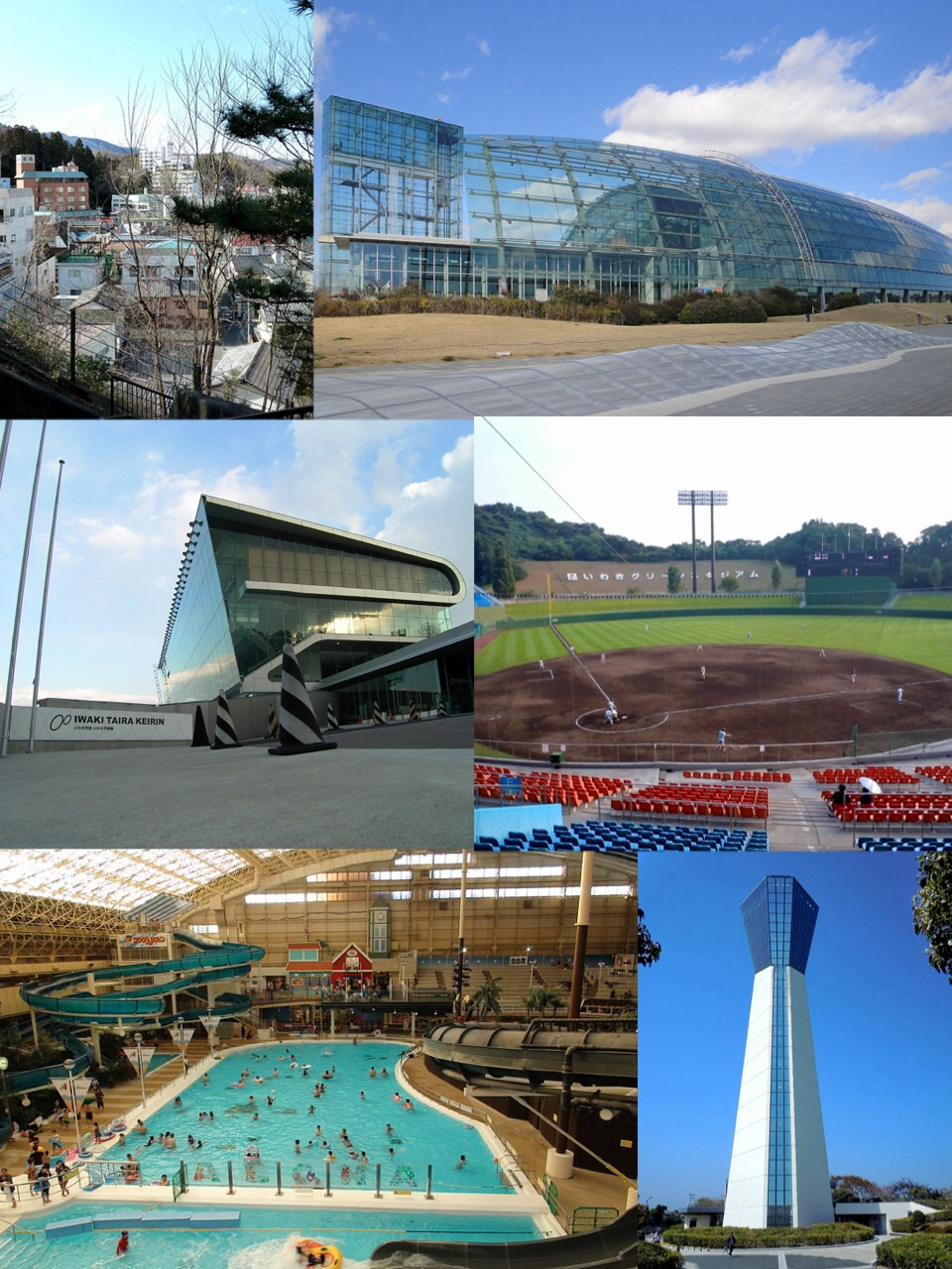 いわき市の景観